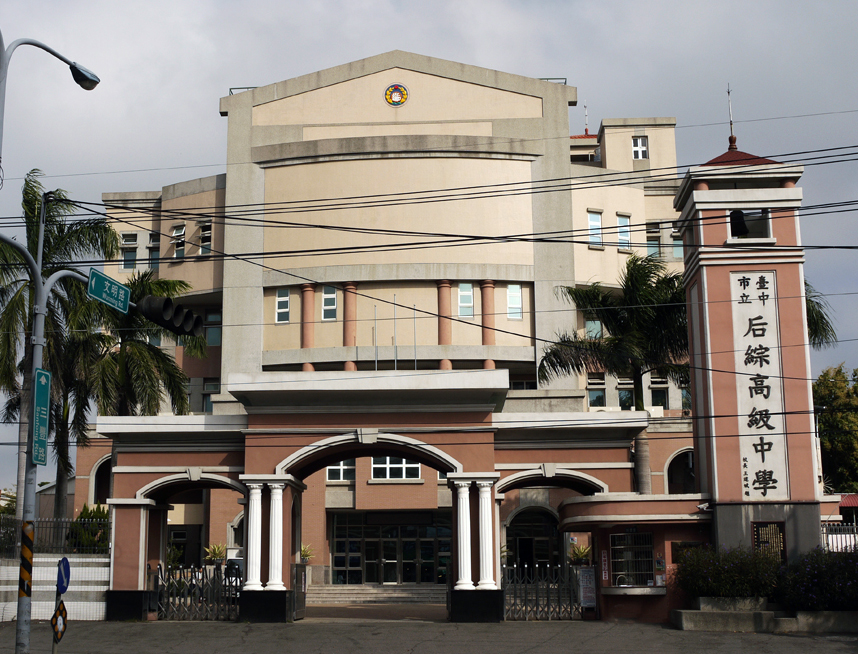 臺中市立后綜高級中學。